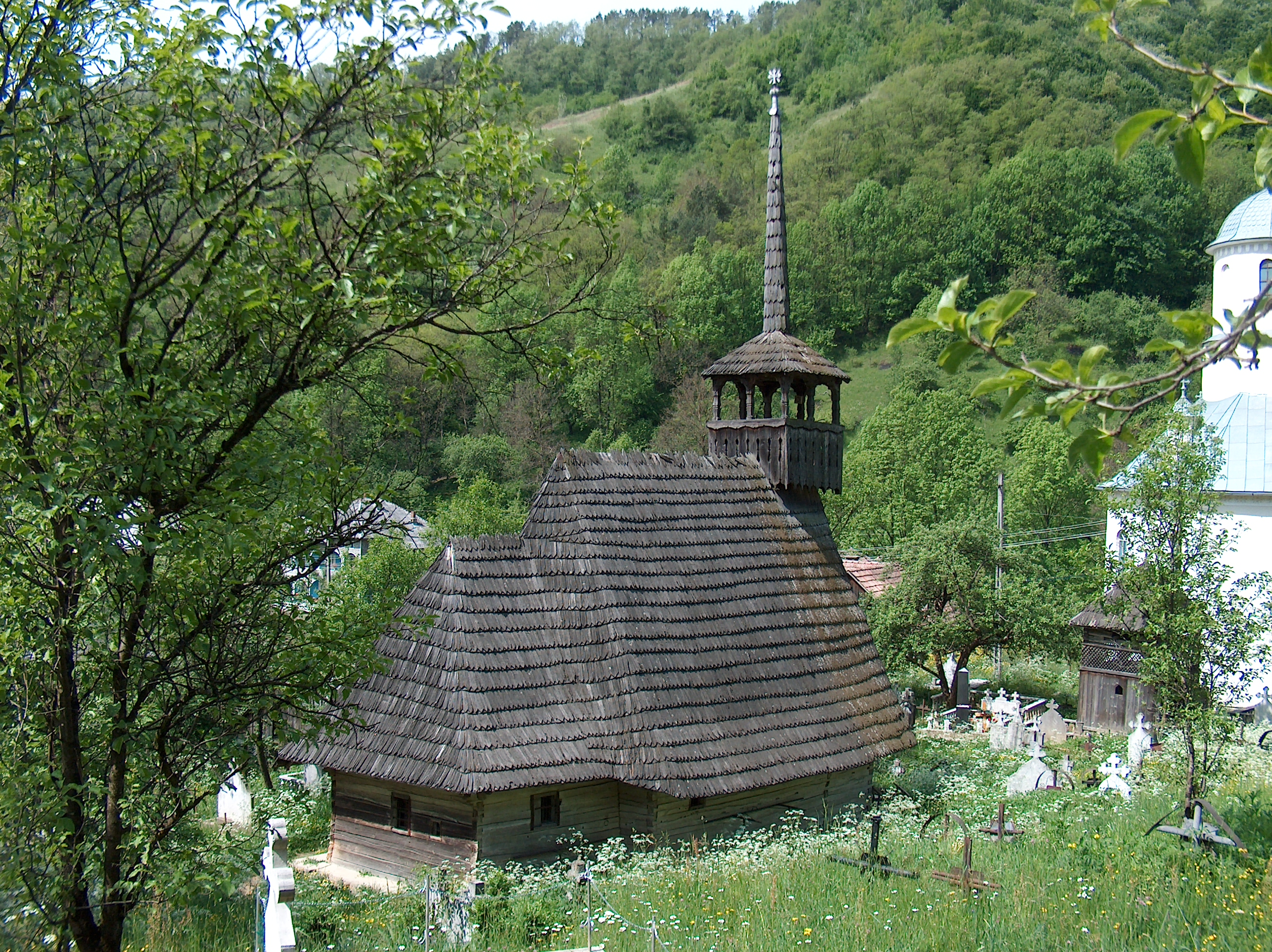 Biserica de lemn din Gersa, comuna Rebrişoara, judeţul Bistriţa Năsăud. Imagine de ansamblu.